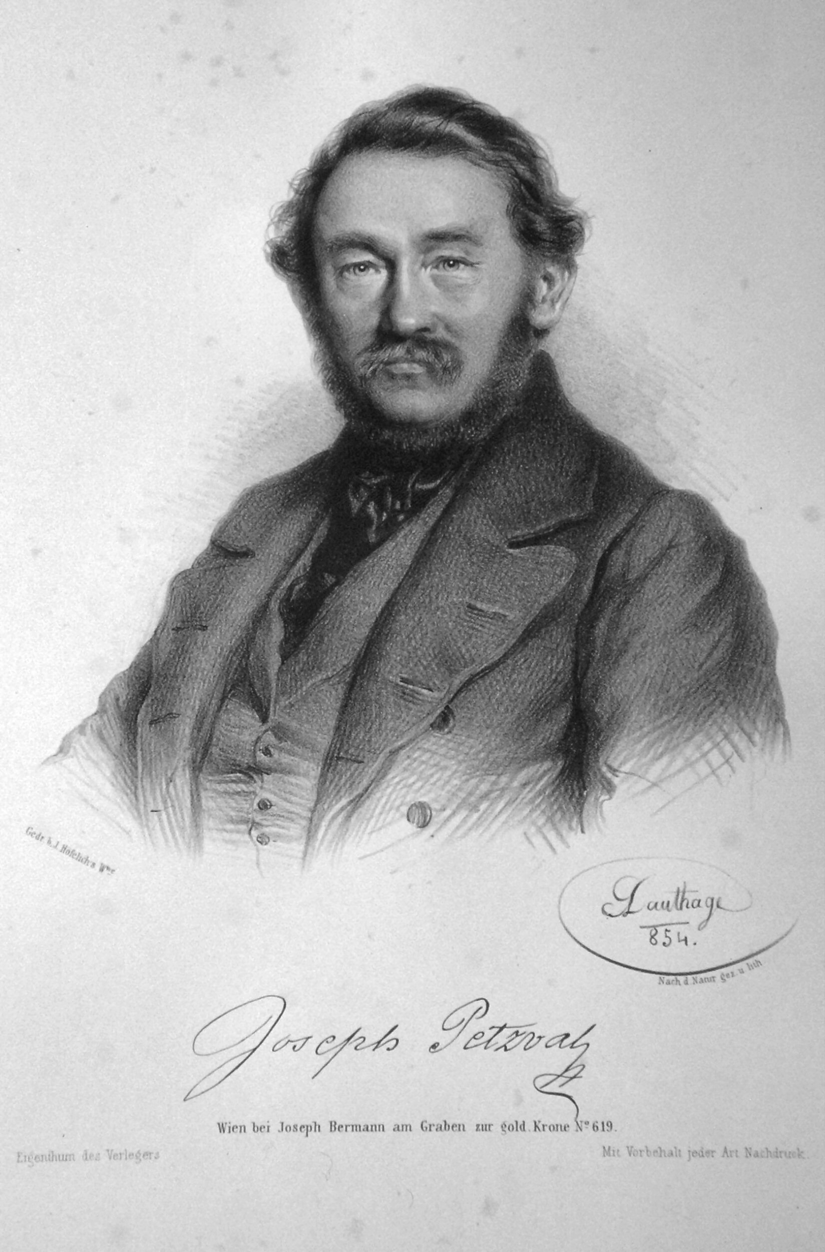 Josef Maximilian Petzval, Lithographie von Adolf Dauthage, 1854